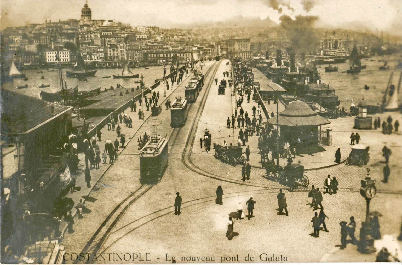 Carte postale ancienne éditée par La Photographie : Constantinople (İstanbul) : Le nouveau pont de Galata